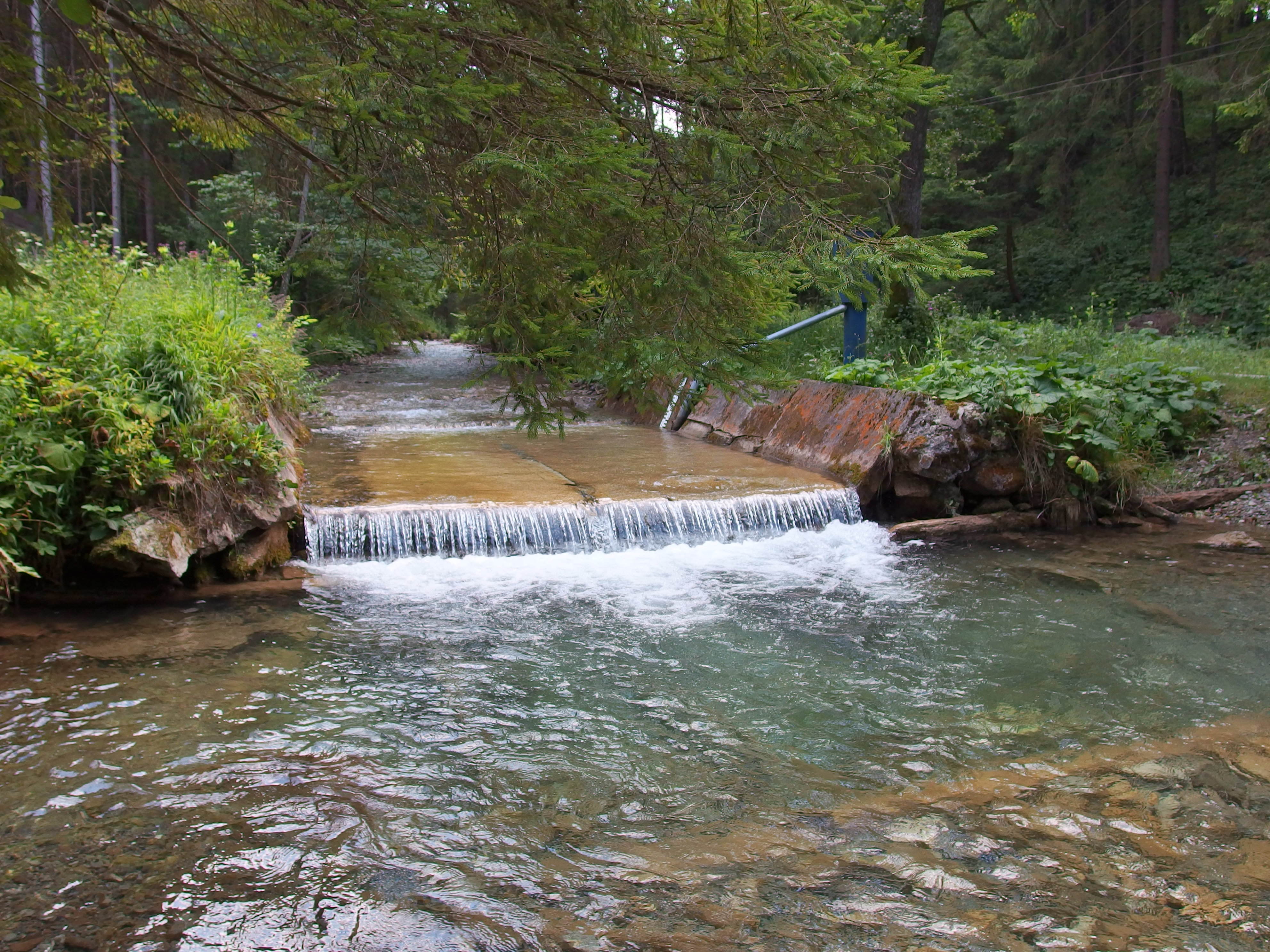 Splav na Necpalskom potoku